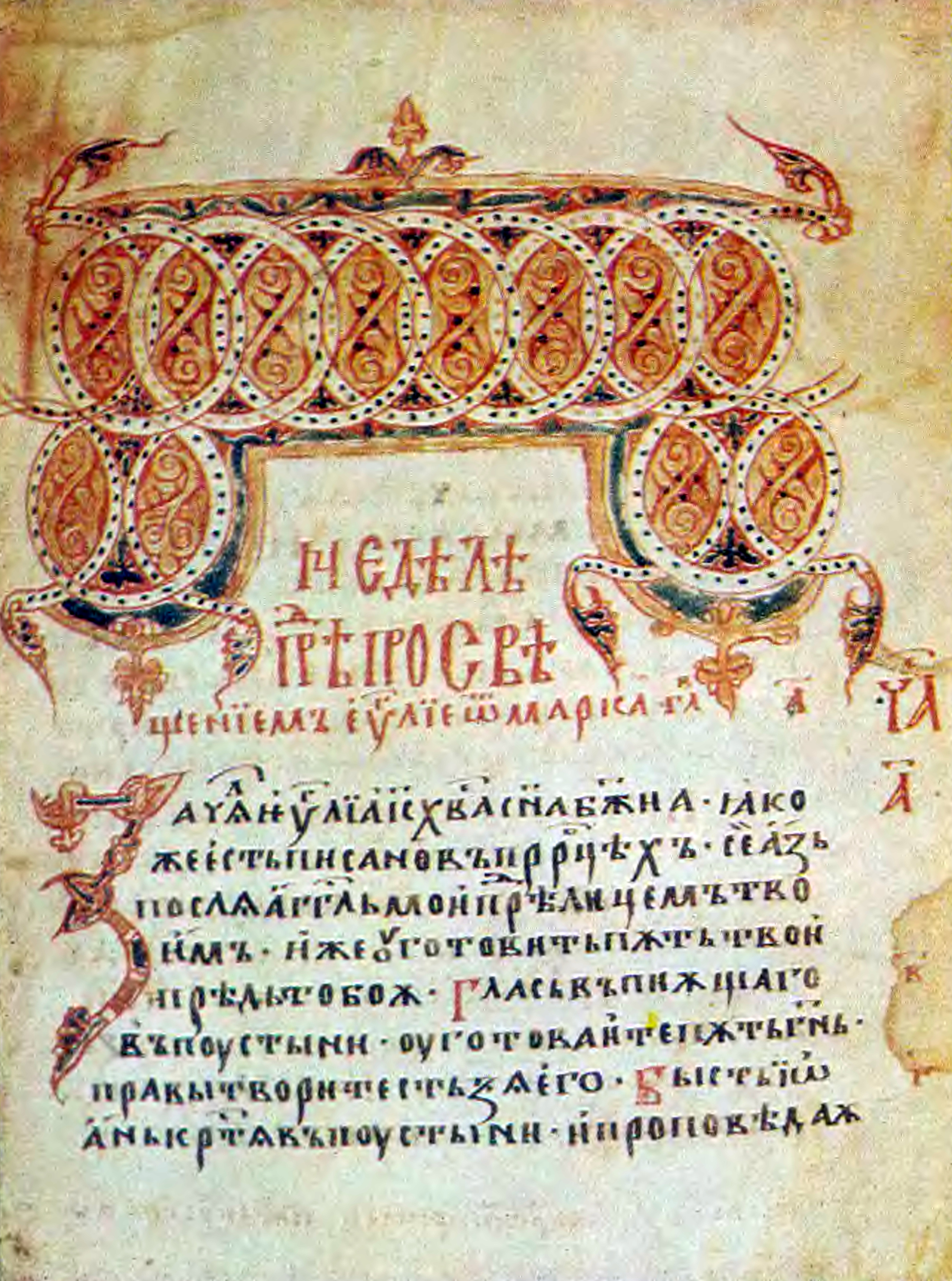 Видинско четвероевангелие